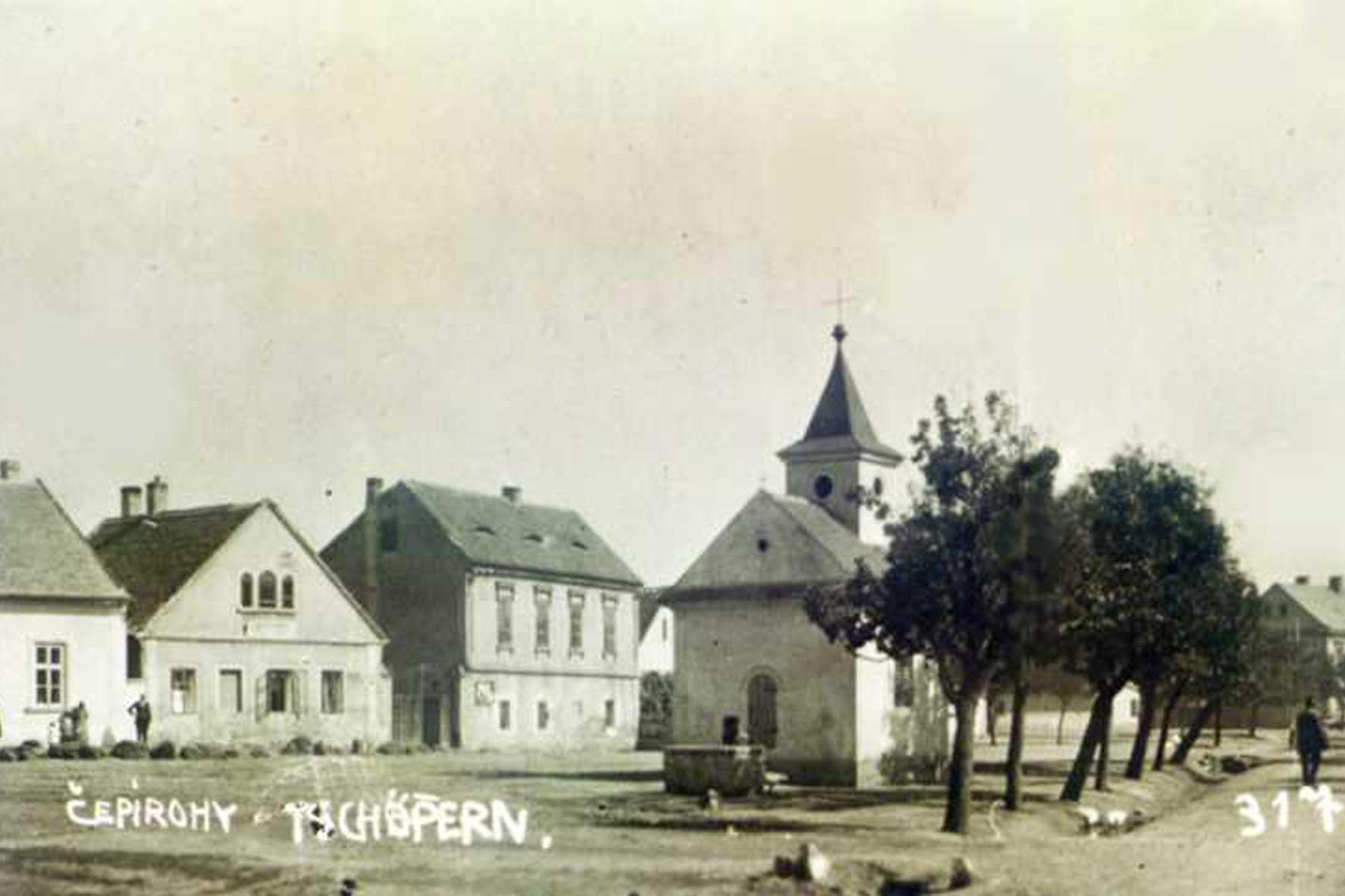 Dorf Čepirohy (Tschöppern) bei Most (Brüx) in Tschechien